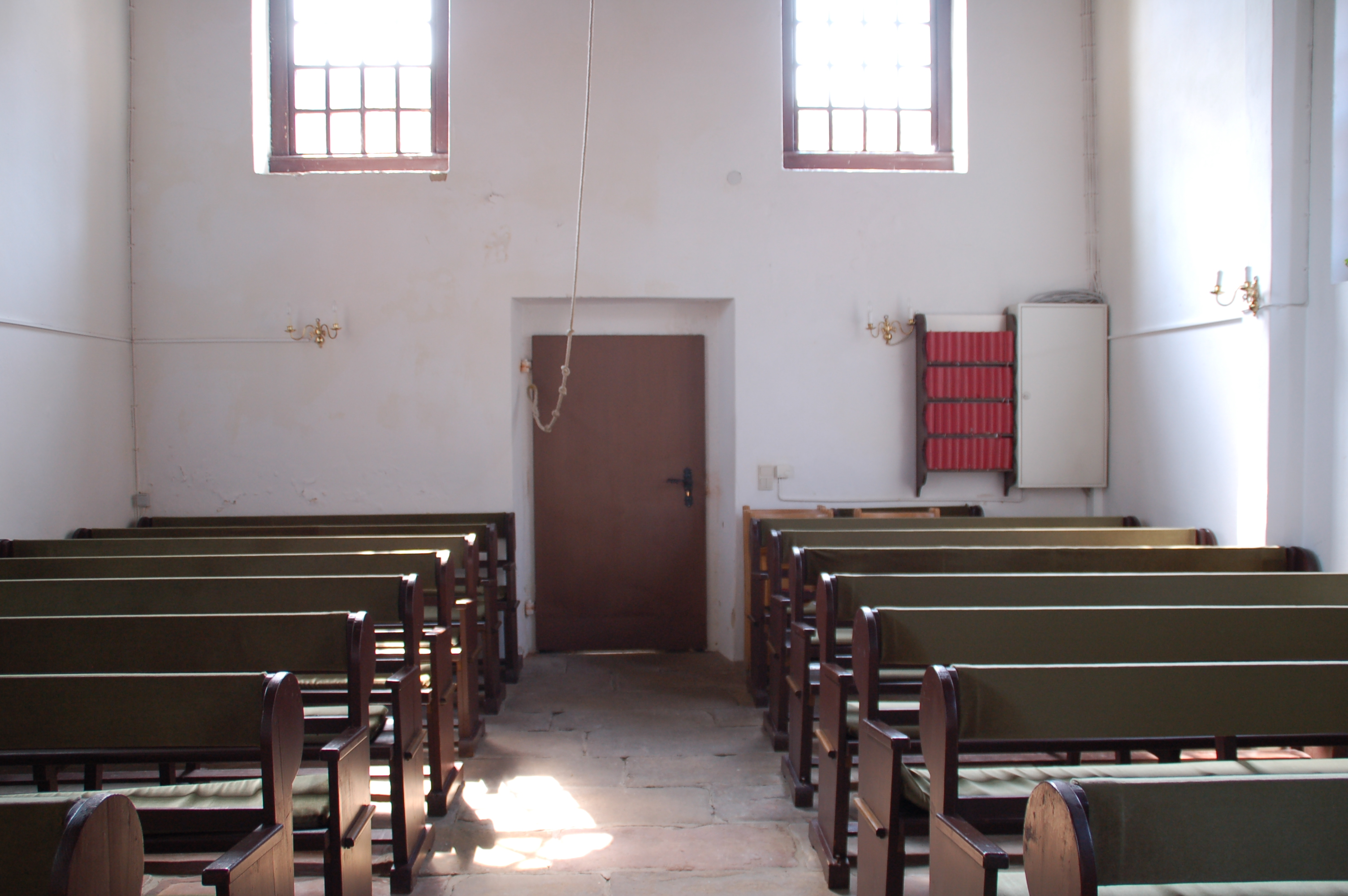 Kapelle Hesepe Innenraum